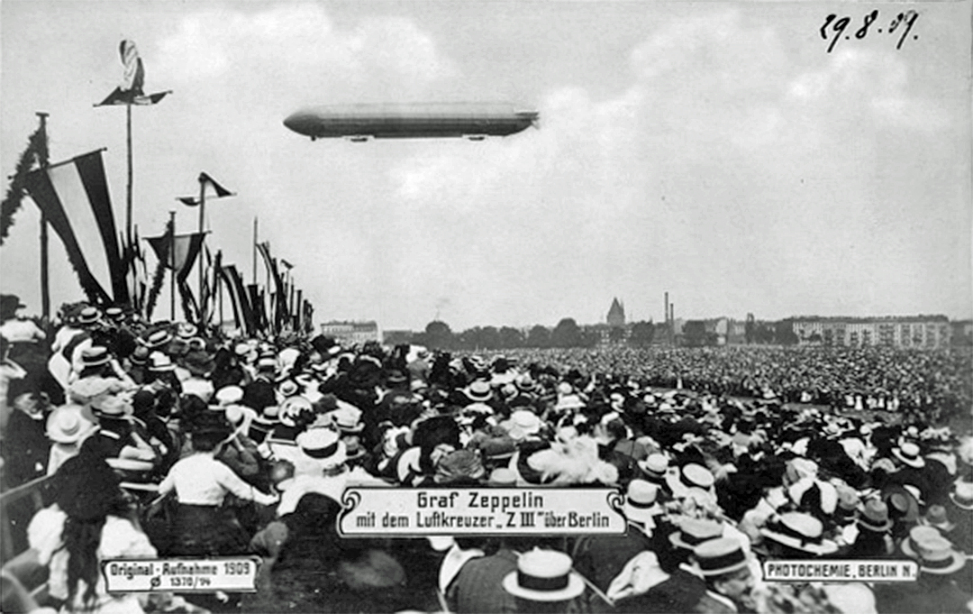 Text der Postkarte: Graf Zeppelin mit dem Luftkreuzer "Z III" über Berlin